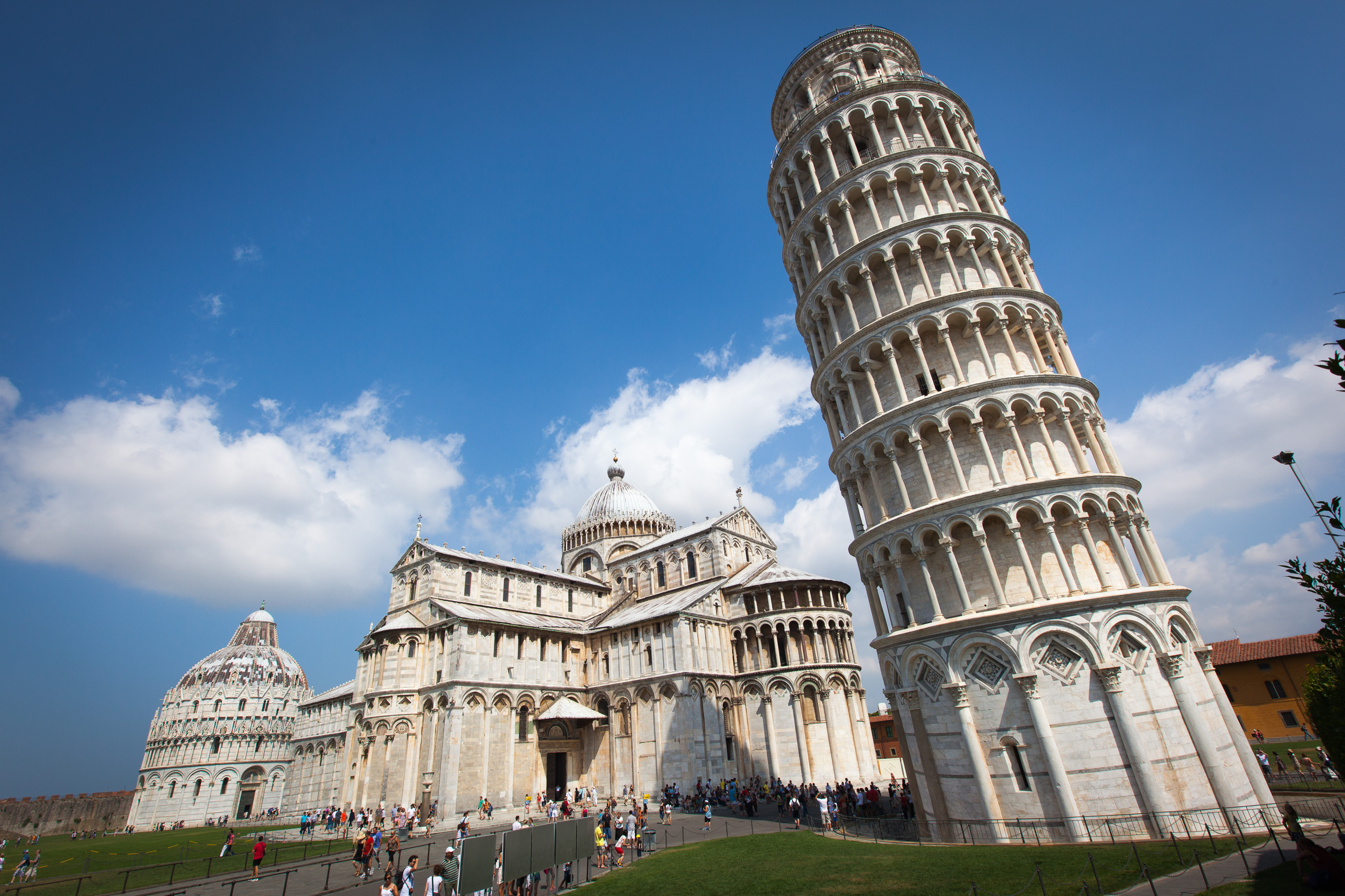 Pisa